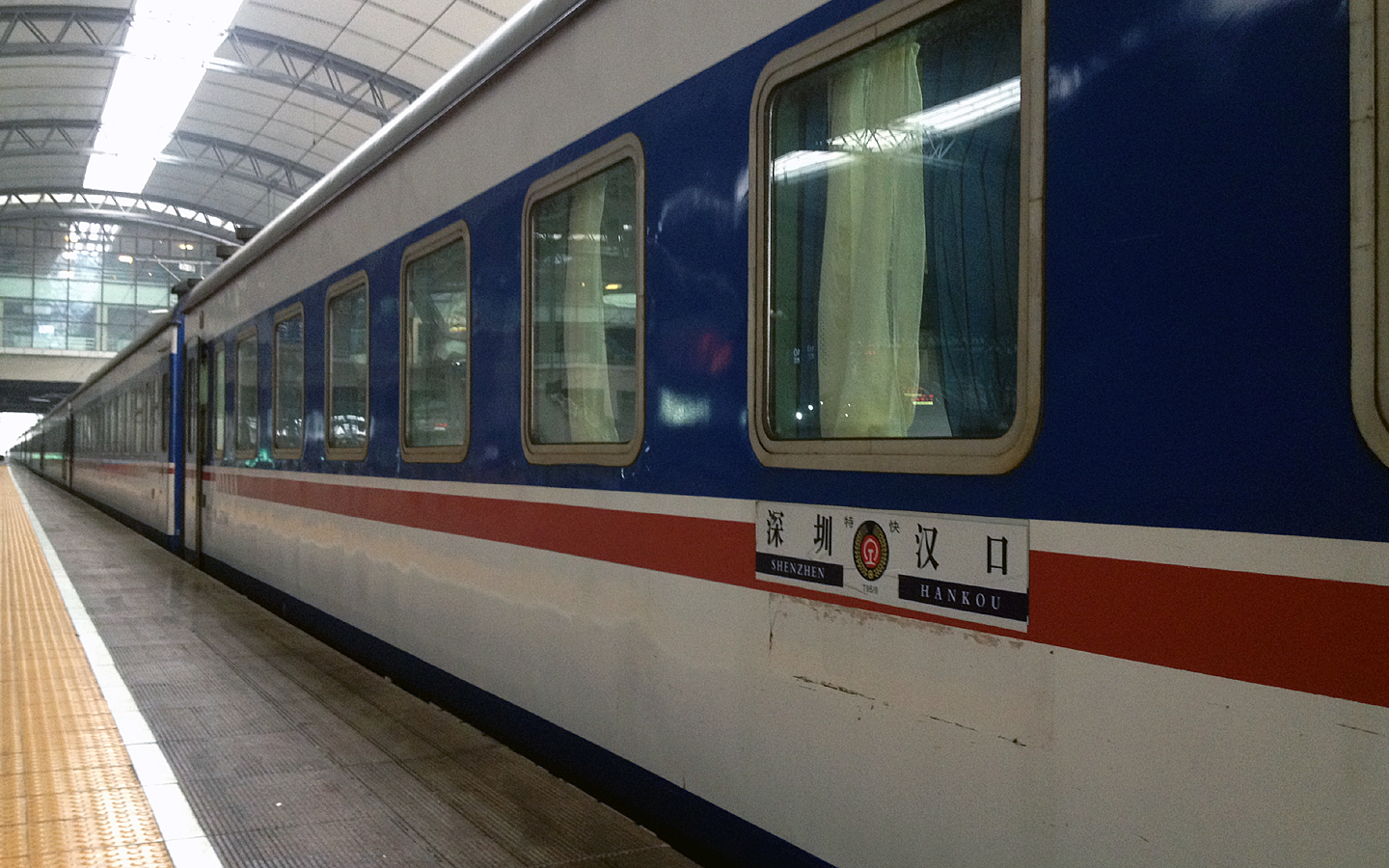 T96次列车停靠于汉口站